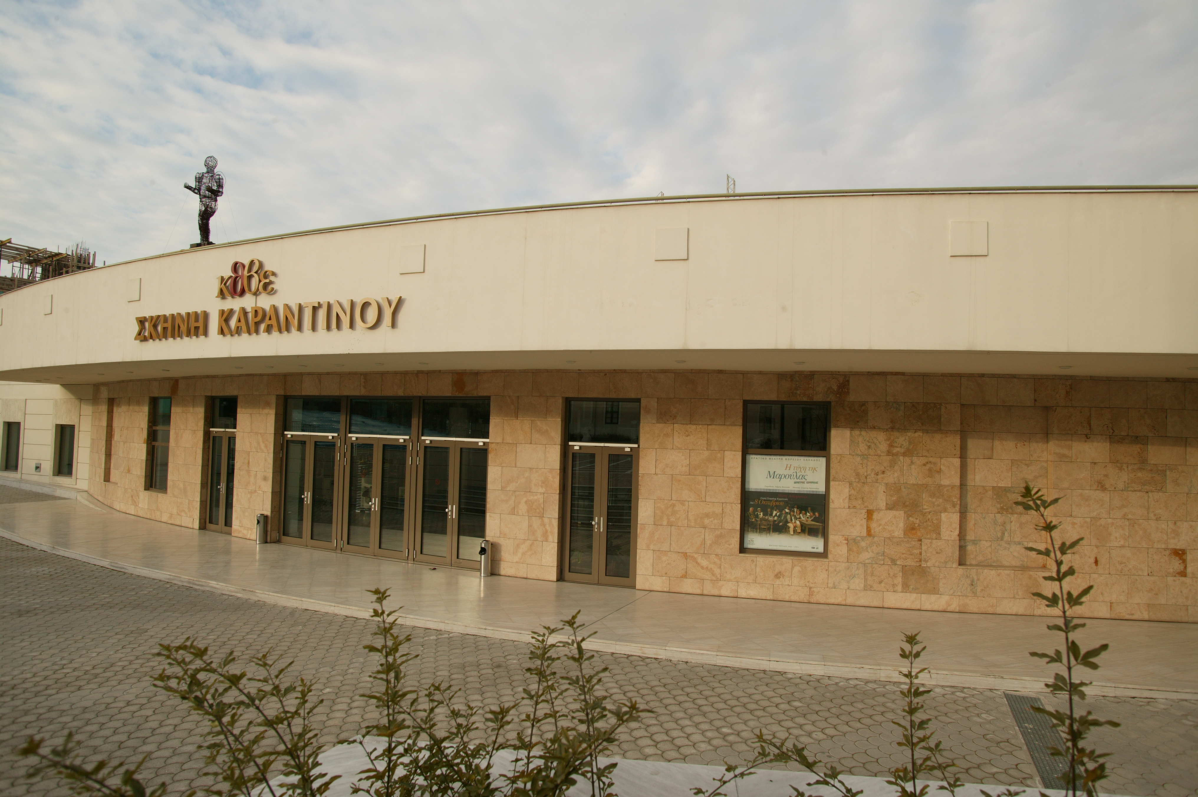 Εξωτερική όψη του Θεάτρου της Μονής Λαζαριστών